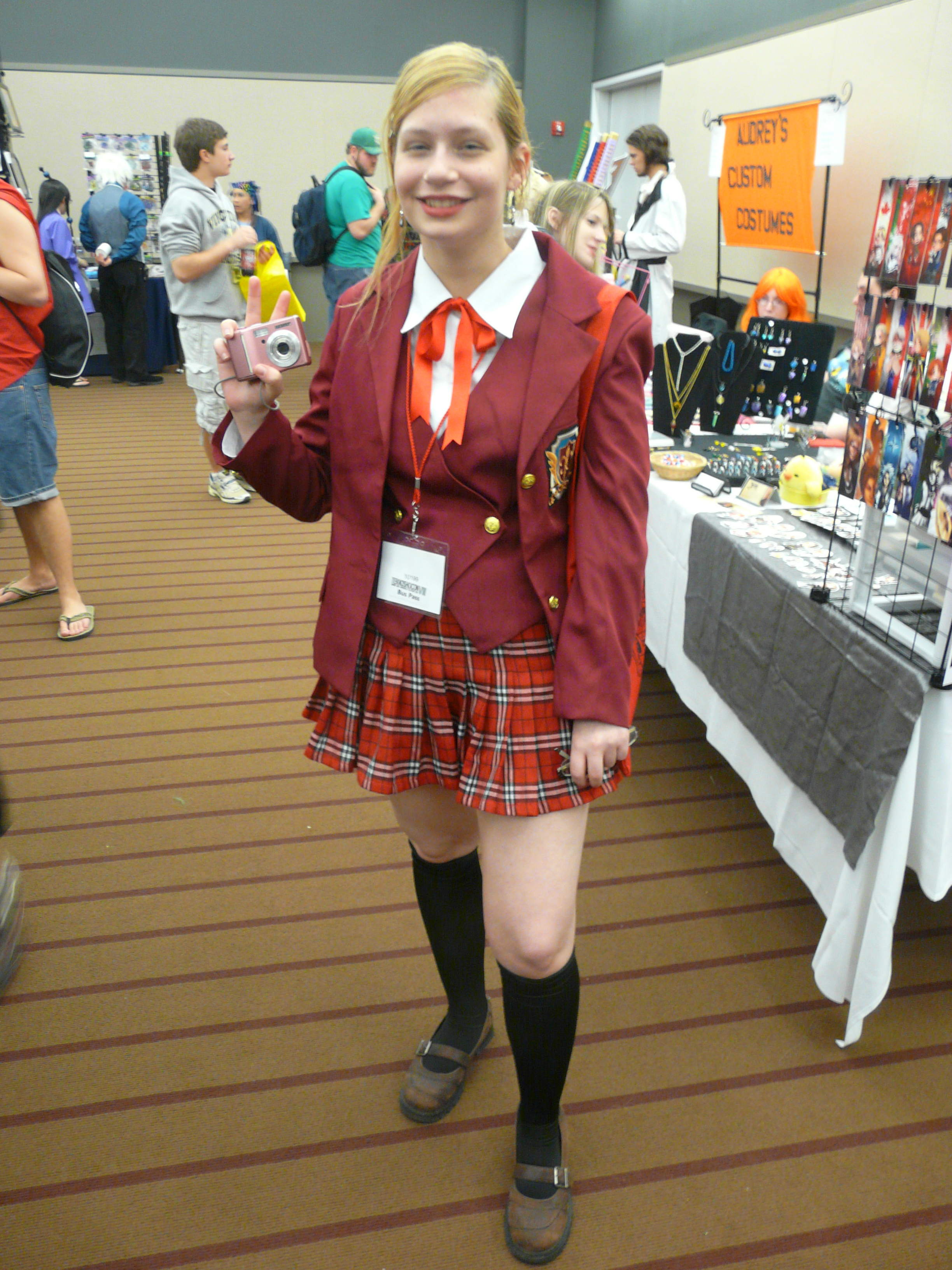 Tekkoshocon 2010，穿《魔法老師》麻帆良學園本校女子中等部冬季制服的cosplayer。